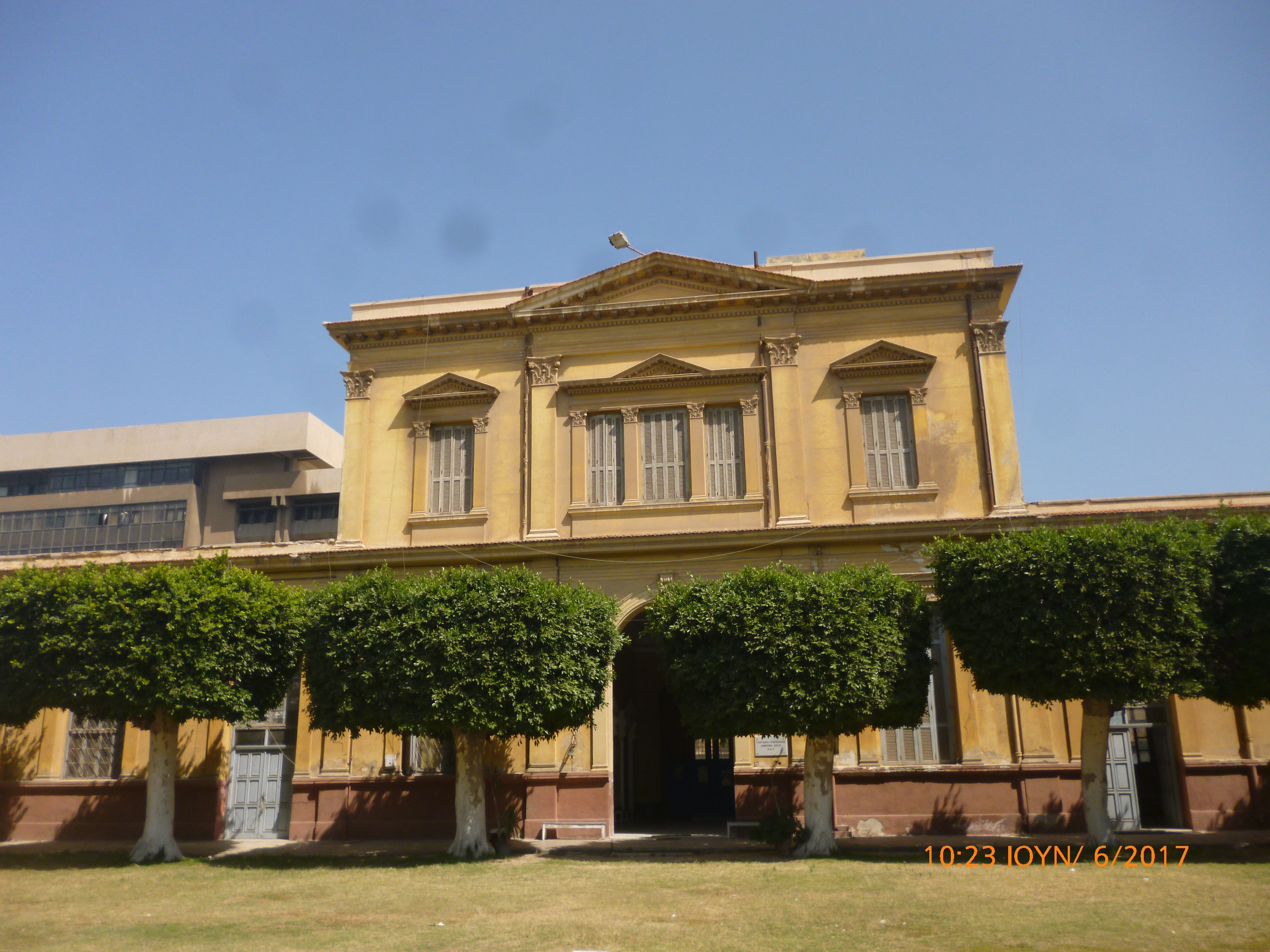 Πρόσοψη Τοσιτσαίας - Πρατσικείου Δημοτικής Σχολής Ελληνικής Κοινότητας Αλεξανδρείας